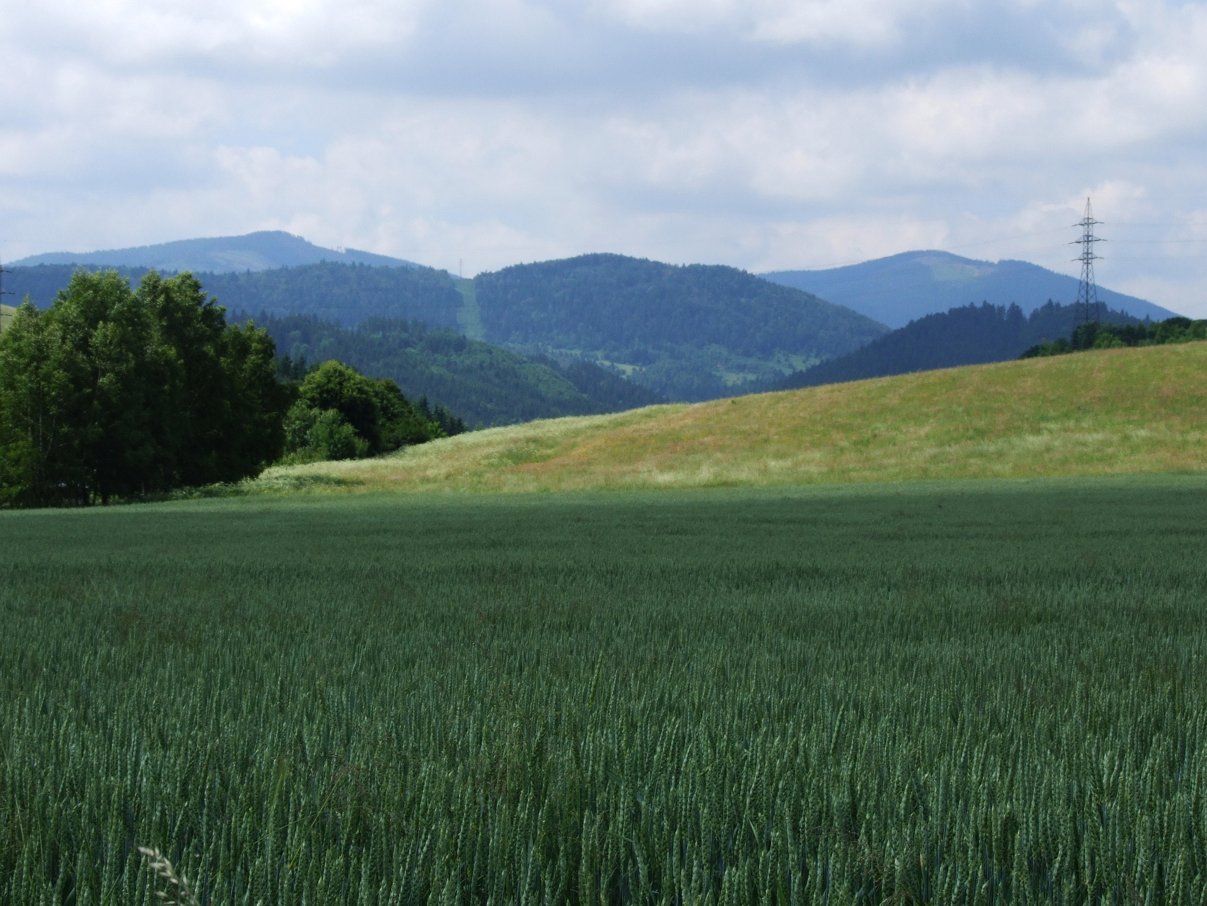 Góry Lewockie, widok z Plavnicy